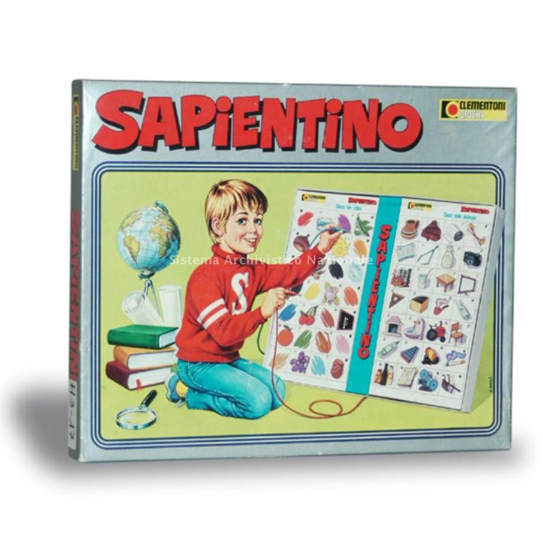 Immagine pubblicitaria del gioco da tavolo Sapientino, 1970 ca